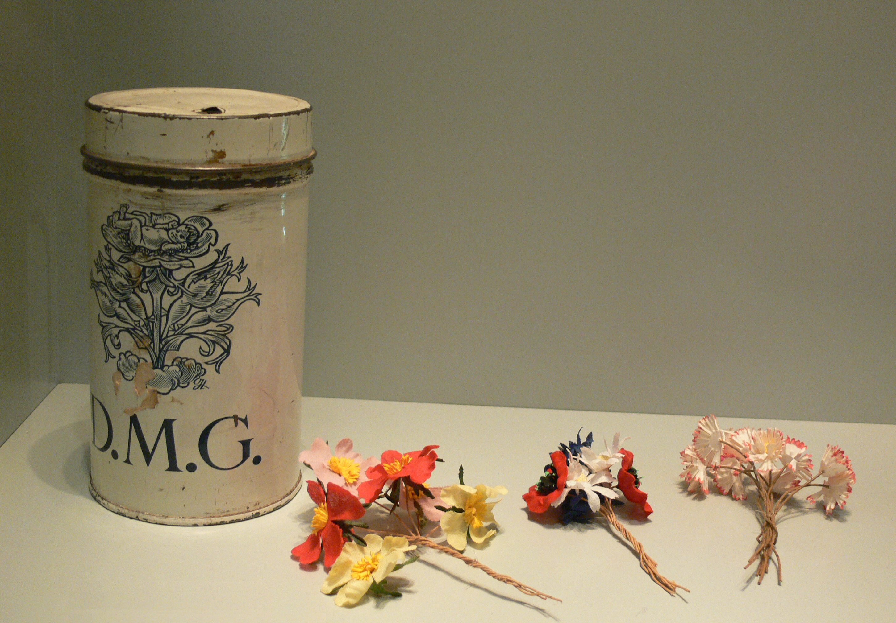 Theodor-Heuss-Haus, Feuerbacher Weg, Stuttgart-Nord Sammelbüchse für das Müttergenesungswerk und Stoffblumen, die gegen Spenden verkauft wurden